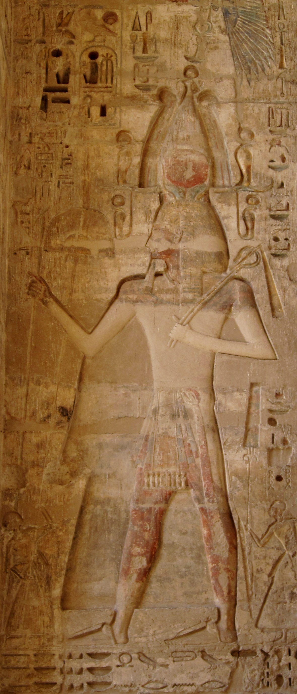 Relief im ersten Hof des Totentempels Ramses’ III. in Medinet Habu, Ägypten